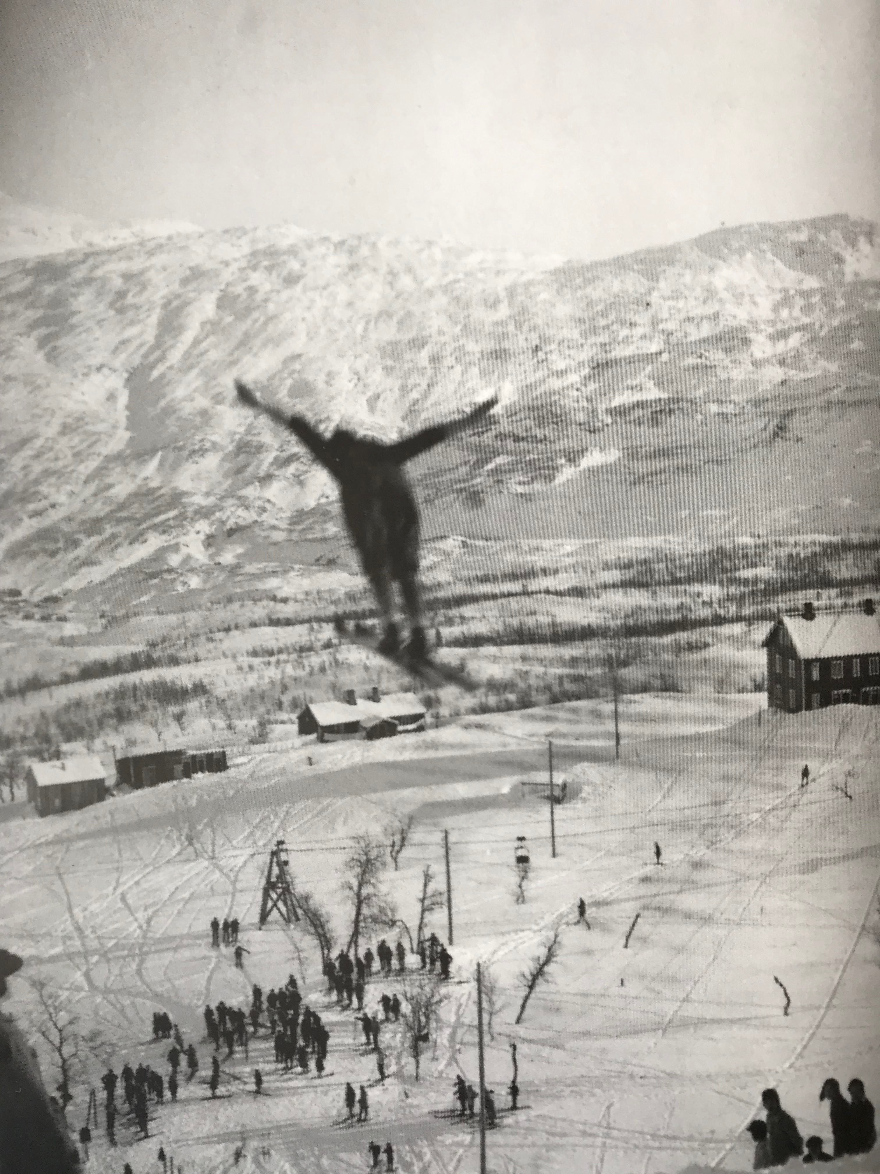 Høytflyvende legender på Jakobsbakken